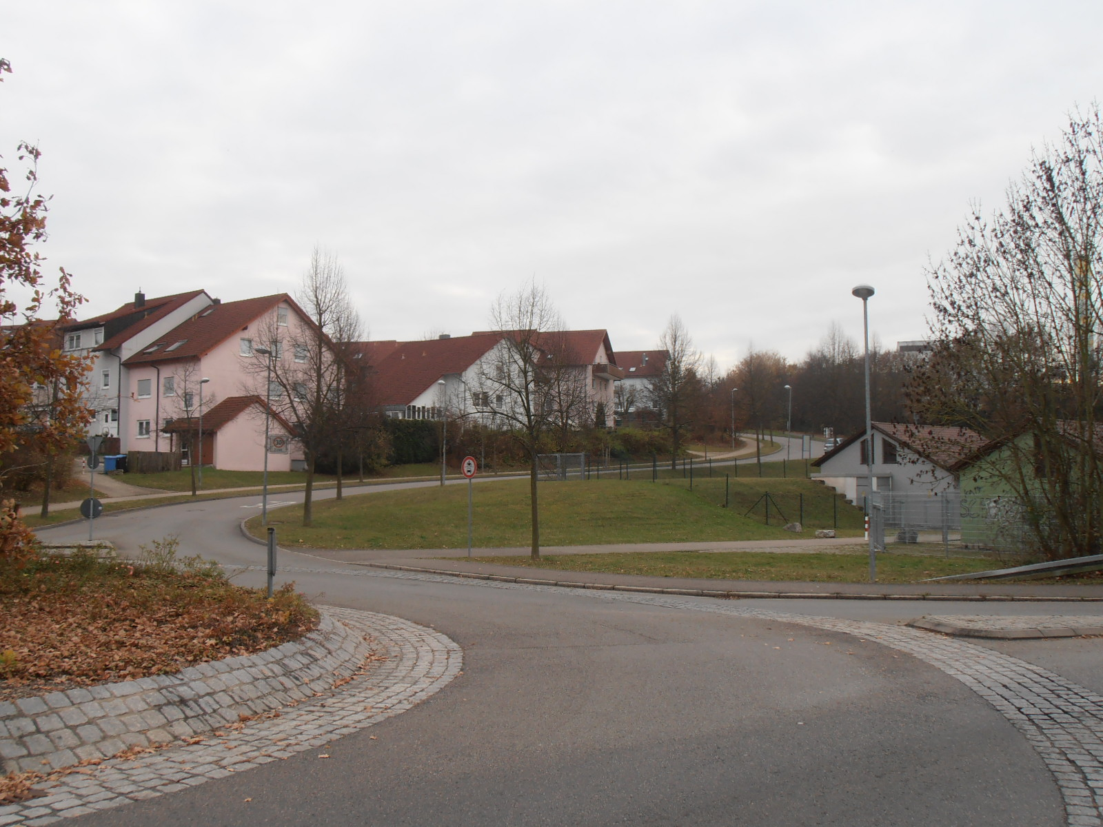 BFH-Plattenwald, einige Wohnhäuser; im Vordergrund Kreisverkehr der K2116; rechts ganz hinten Gebäude des "Klinikum am Plattenwald"